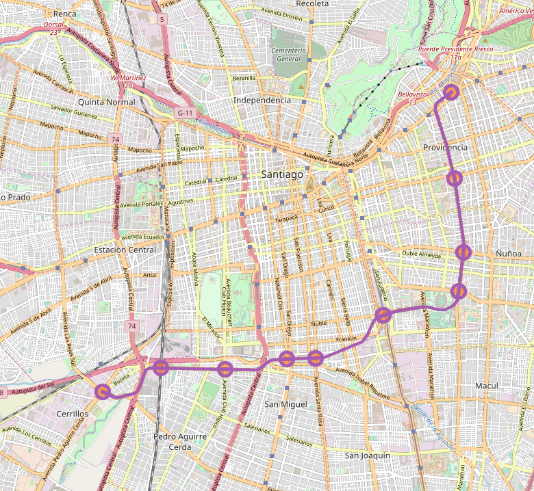 Mapa con el recorrido de la Línea 6 del Metro de Santiago